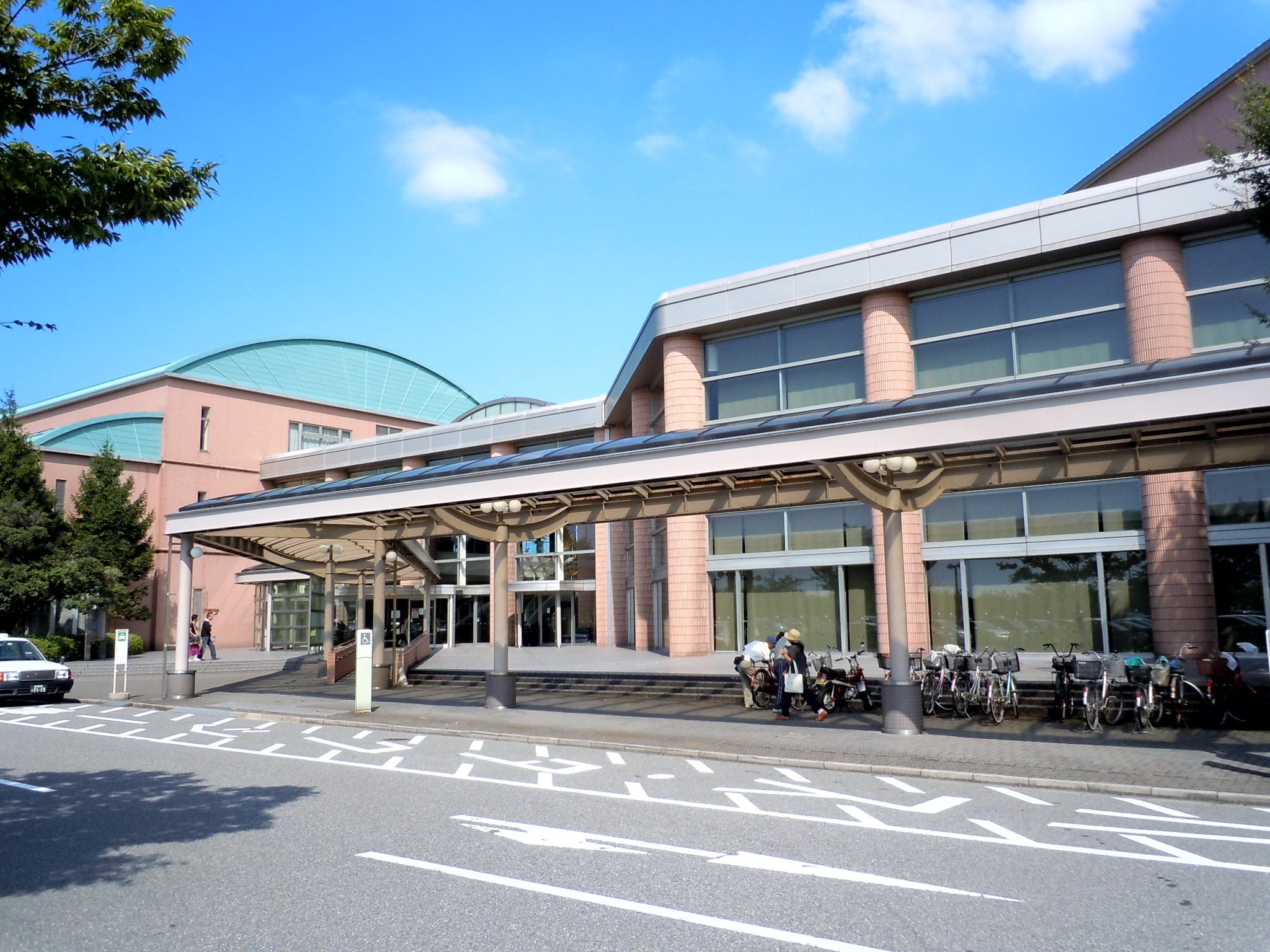 新潟テルサ